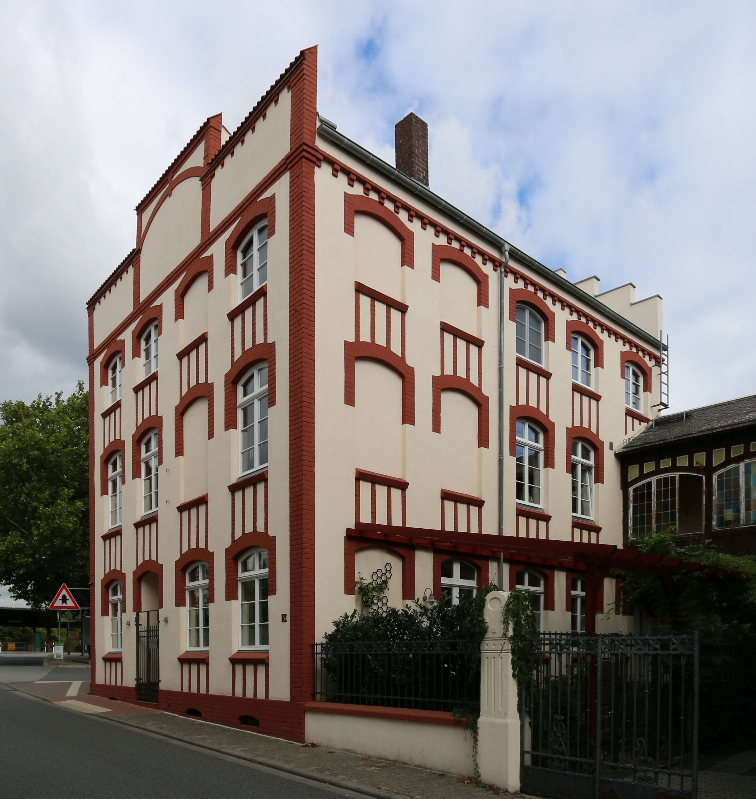 Eltville, Rheingau: Denkmalgeschütztes Gebäude Bahnhofstraße 5. Elektrotechnische Anstalt von 1907. Erster Firmensitz der Jean Müller Elektrotechnischen Fabrik.